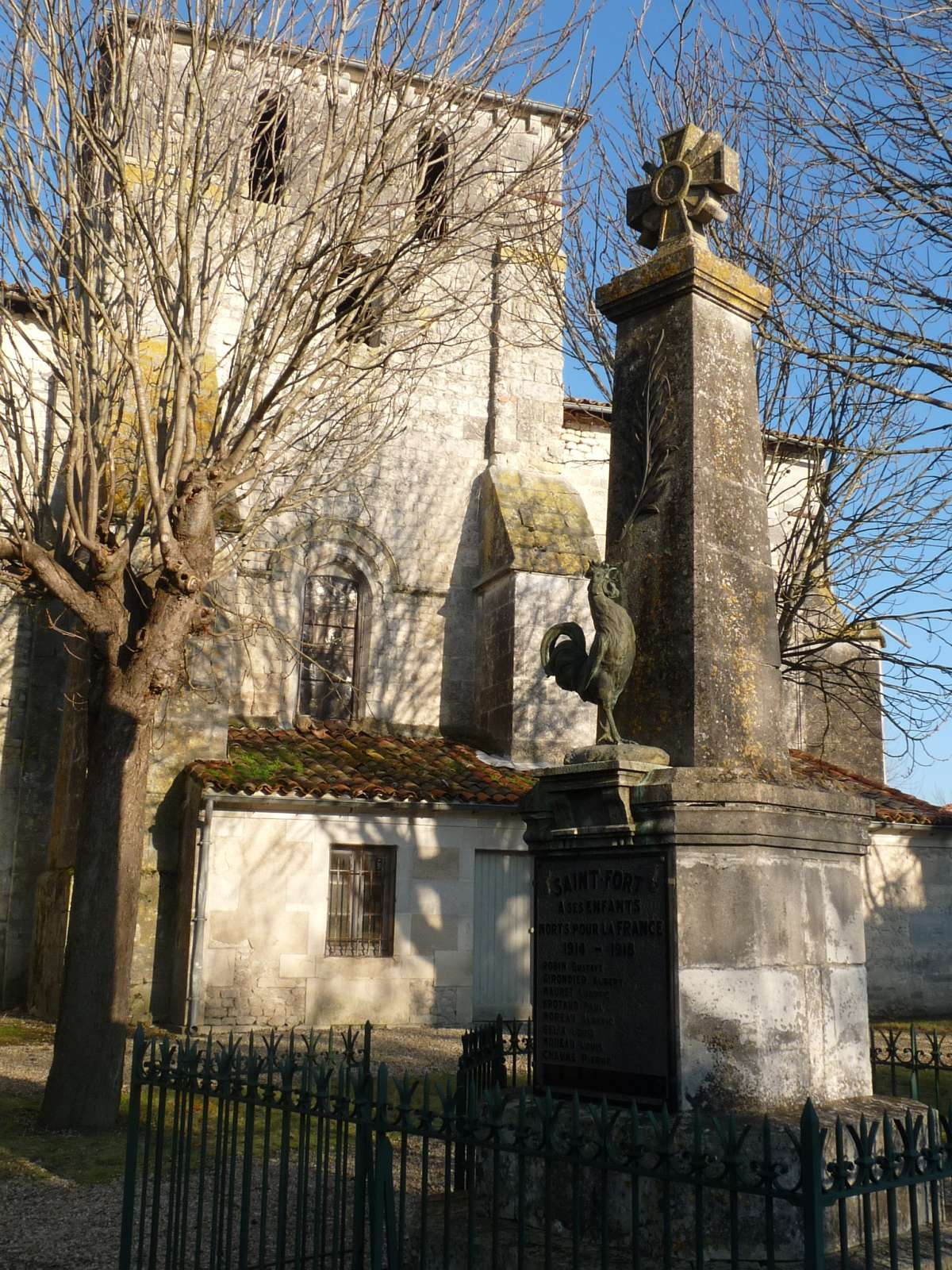 monument aux mort devant l'église de St-Fort-sur-le-Né, Charente, France